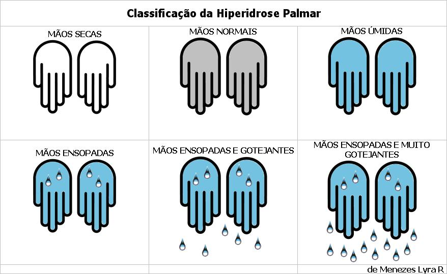 Figura classificação hiperidrose palmar.